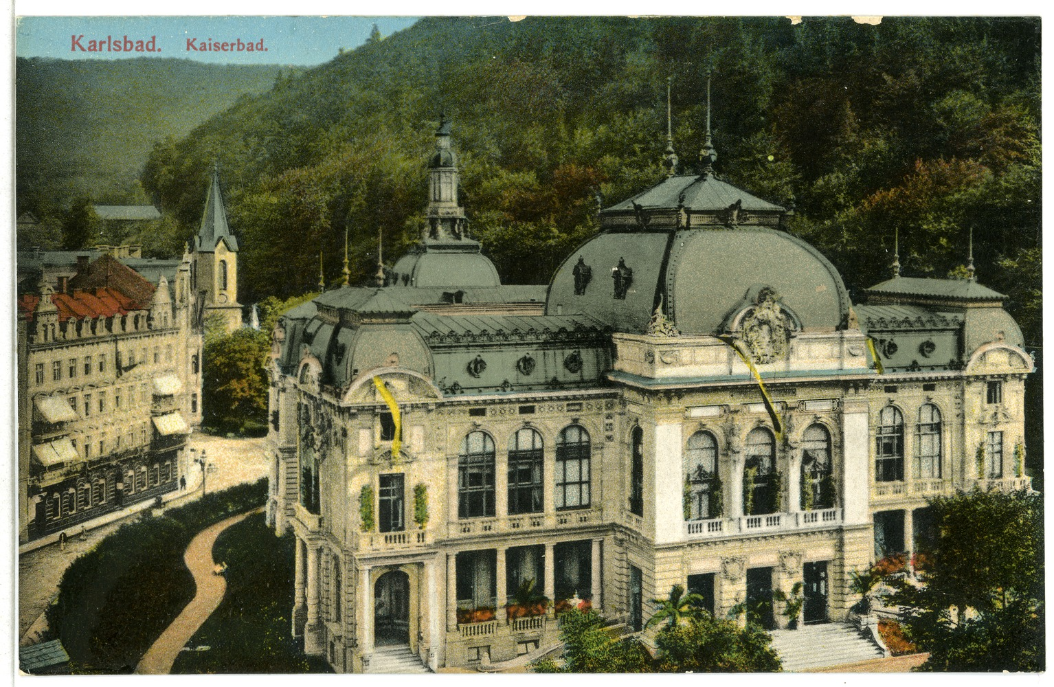 Karlsbad; Kaiserbad This postcard is from publisher Brück & Sohn in Meißen ( postcard has a unique number 12182 and is available in a higher resolution at the publisher. This images was uploaded in a cooperation project between Wikipedians and the publisher.